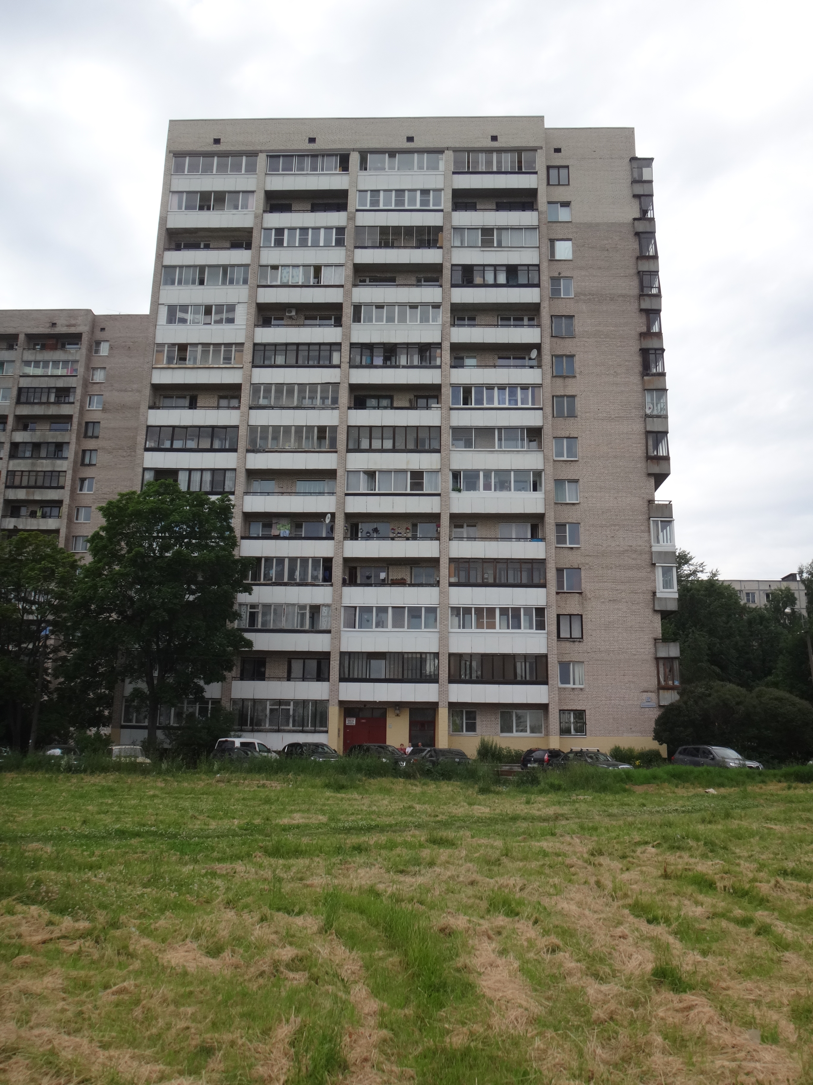 Дом типа 1-528кп80э